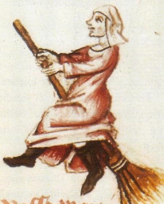 Détail de : Hexenflug der "Vaudoises" (hier Hexen, ursprünglich Waldenser) auf dem Besen, Miniatur in einer Handschrift von Martin Le France, Le champion des dames, 1451 in W. Schild, Die Maleficia der Hexenleut, 1997, S. 97